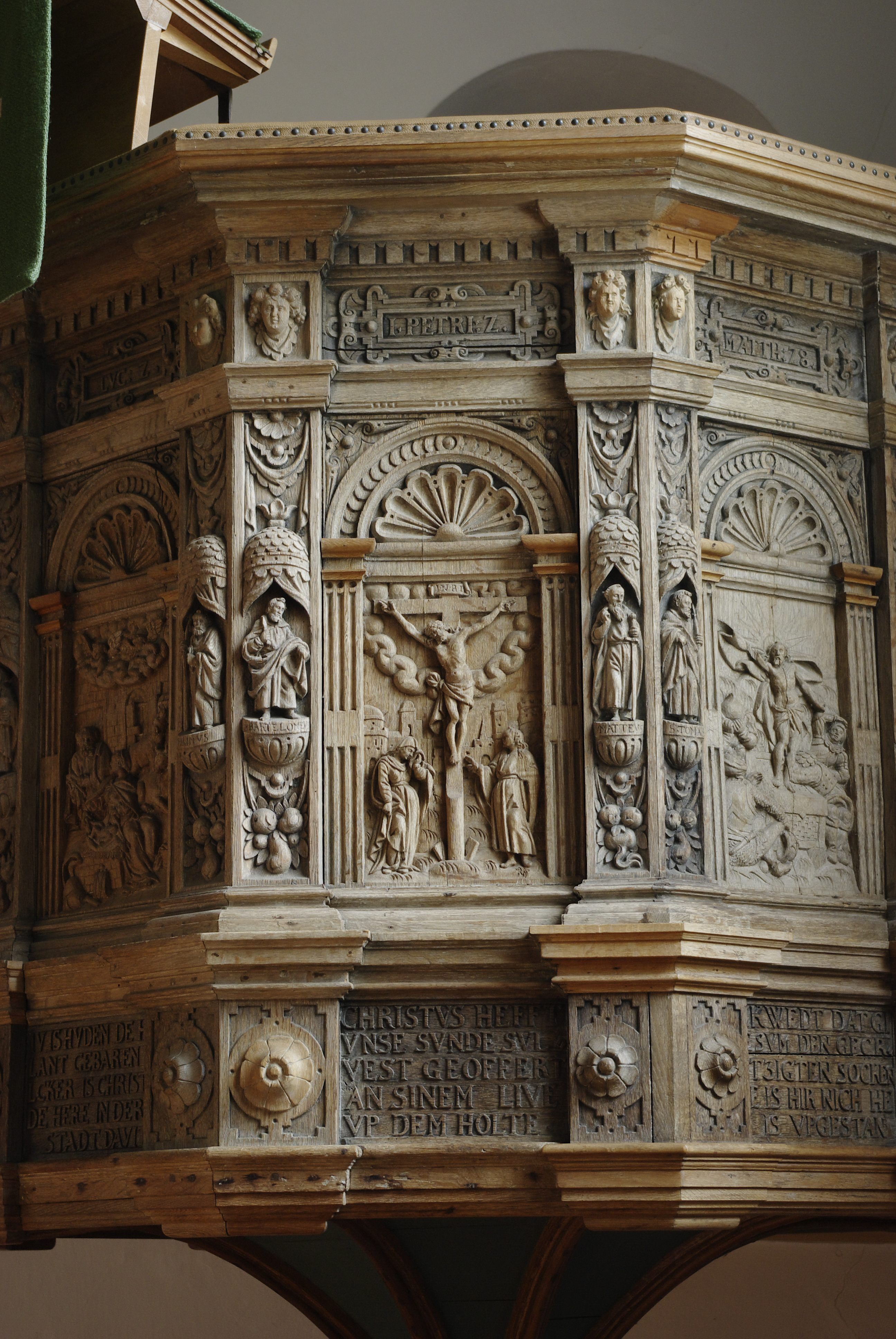 Kulturdenkmale in Friedrichstadt Nummer 19 Zähler 1